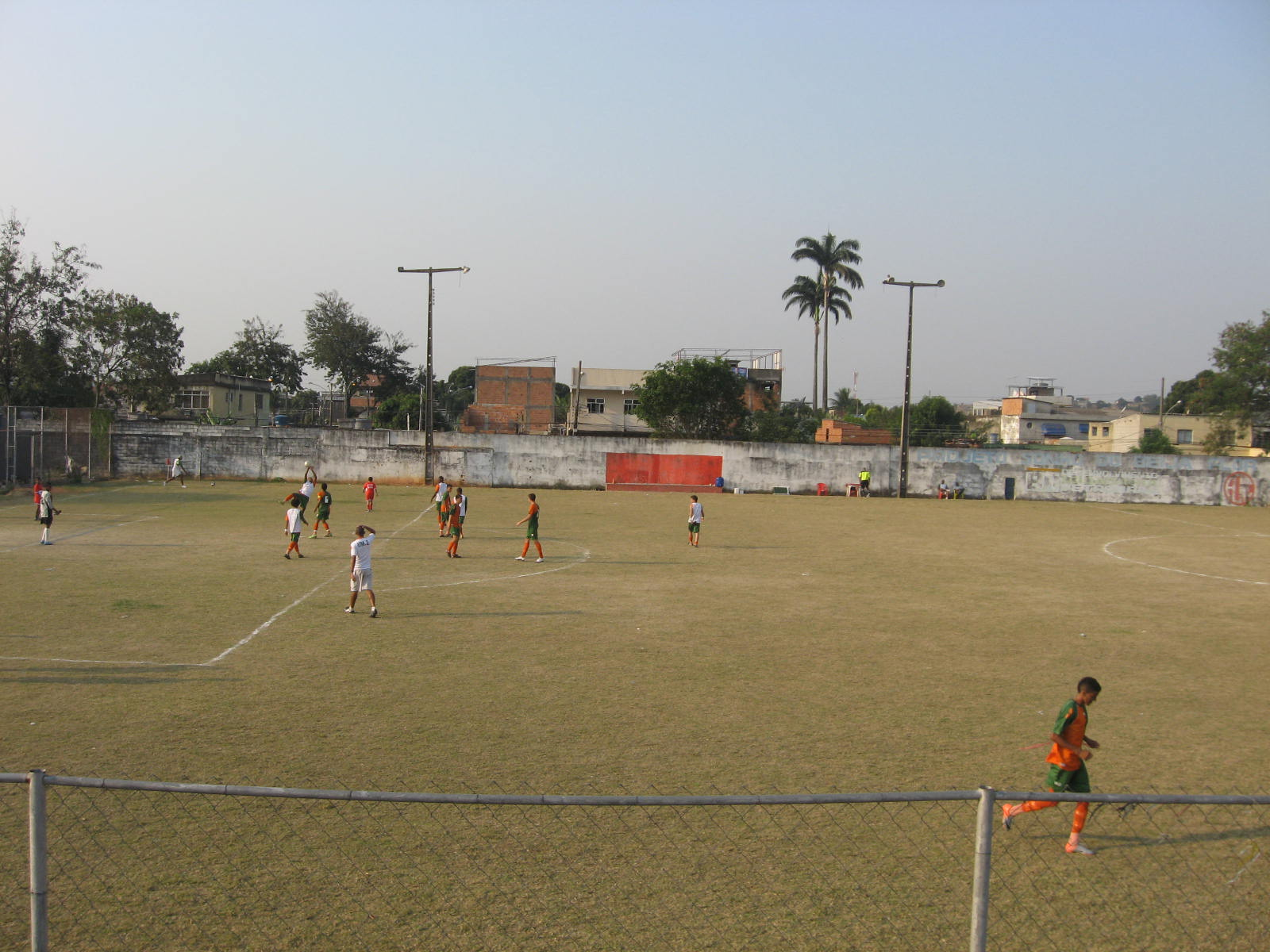 Estádio Joaquim de Almeida Flores, em Nilópolis, pertencente ao EC Nova Cidade.